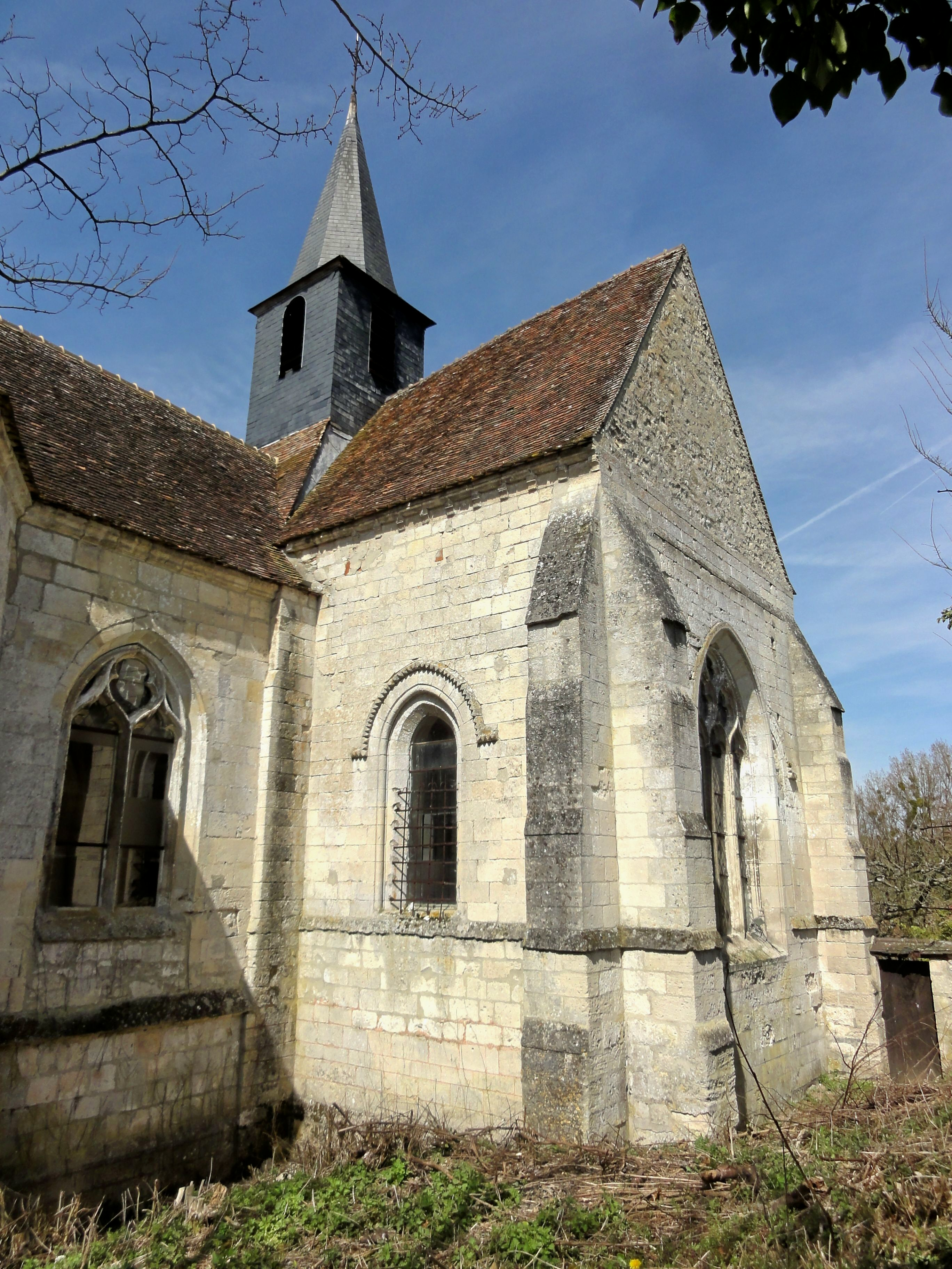 Chœur ; vue depuis le sud-est.